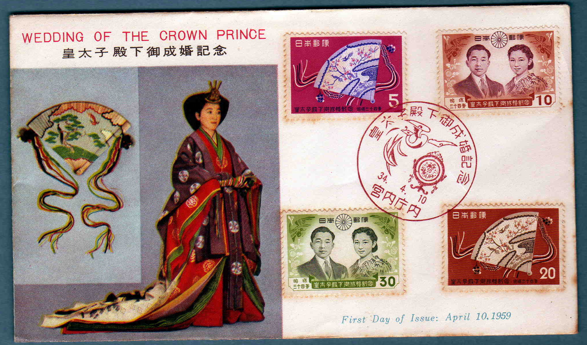 今上天皇の皇太子時代の御成婚記念切手の初日カバー。押印されているのは宮内庁内郵便局の特印である。